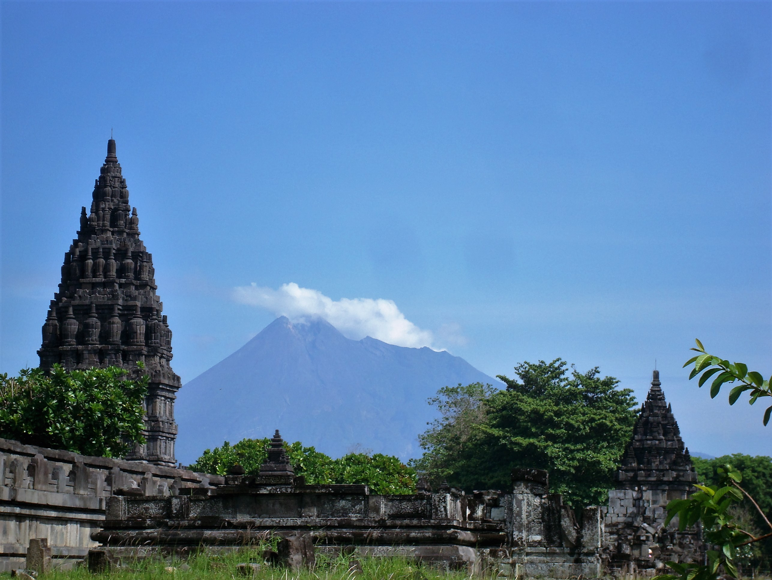 Prambanan mit Merapi im Hintergrund